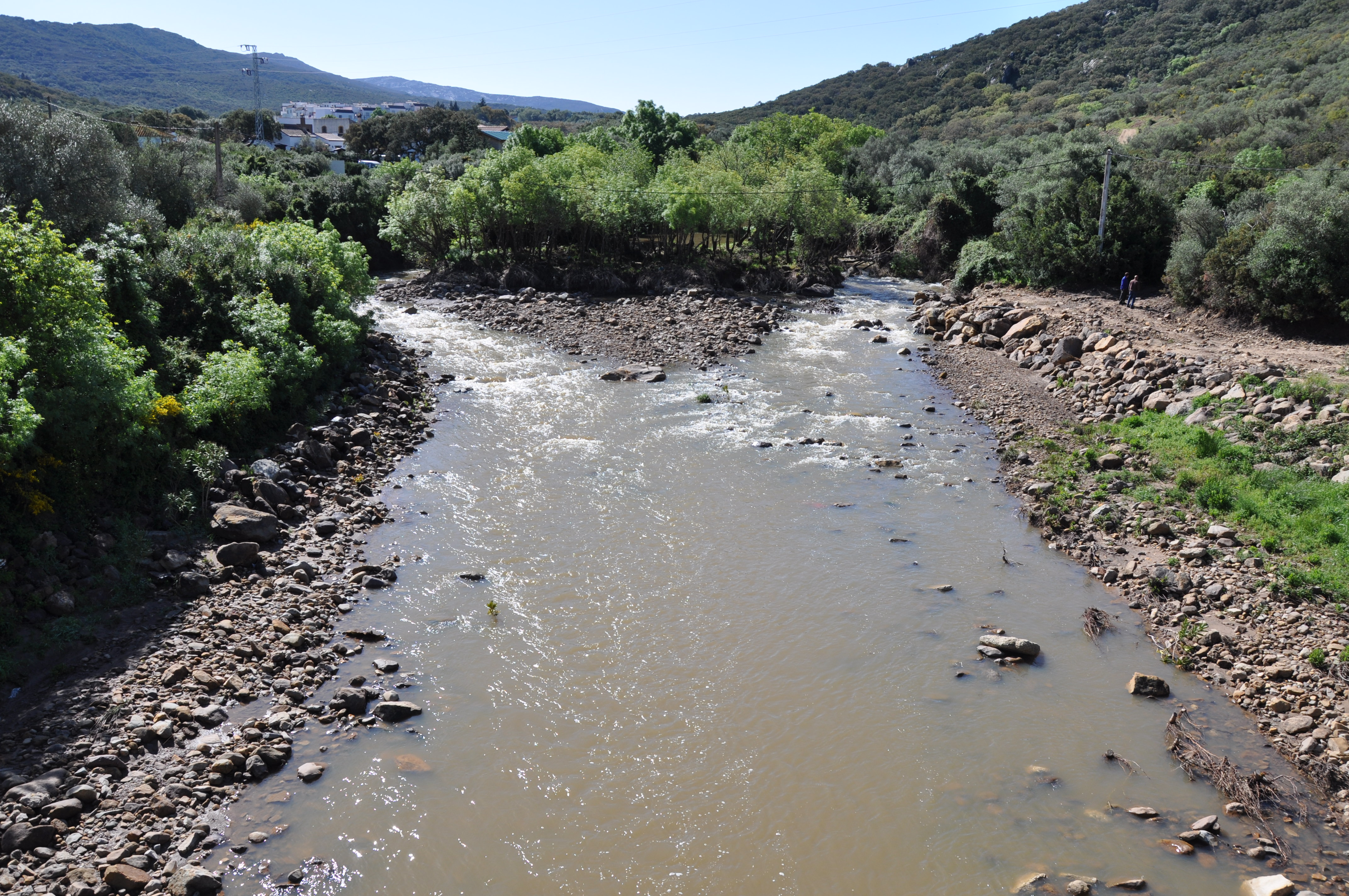 Río Celemín en la Las Lagunetas, Benalup, Cádiz, España